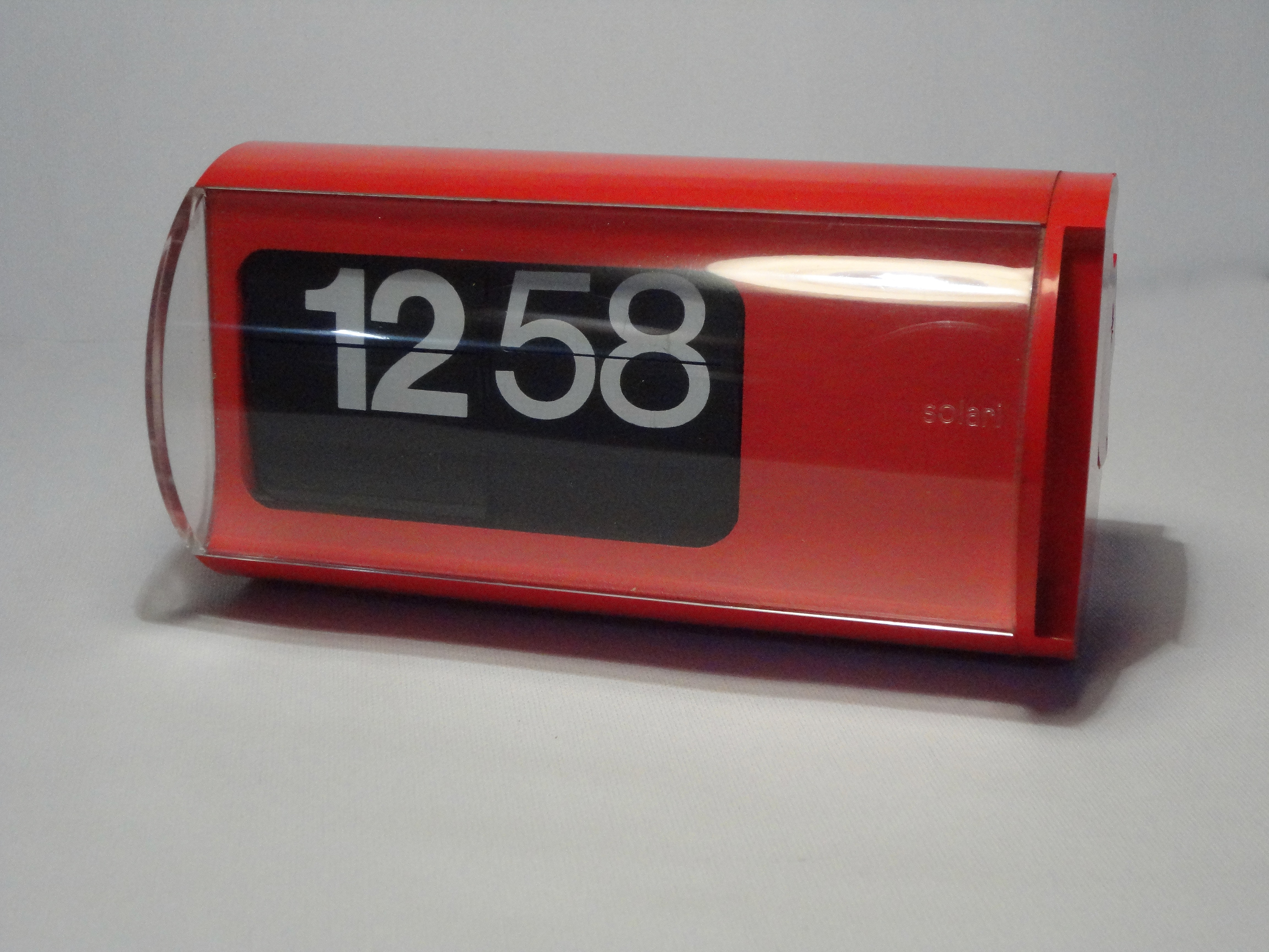 Orologio Solari Cifra 3 realizzato a Udine, Friuli Venezia Giulia